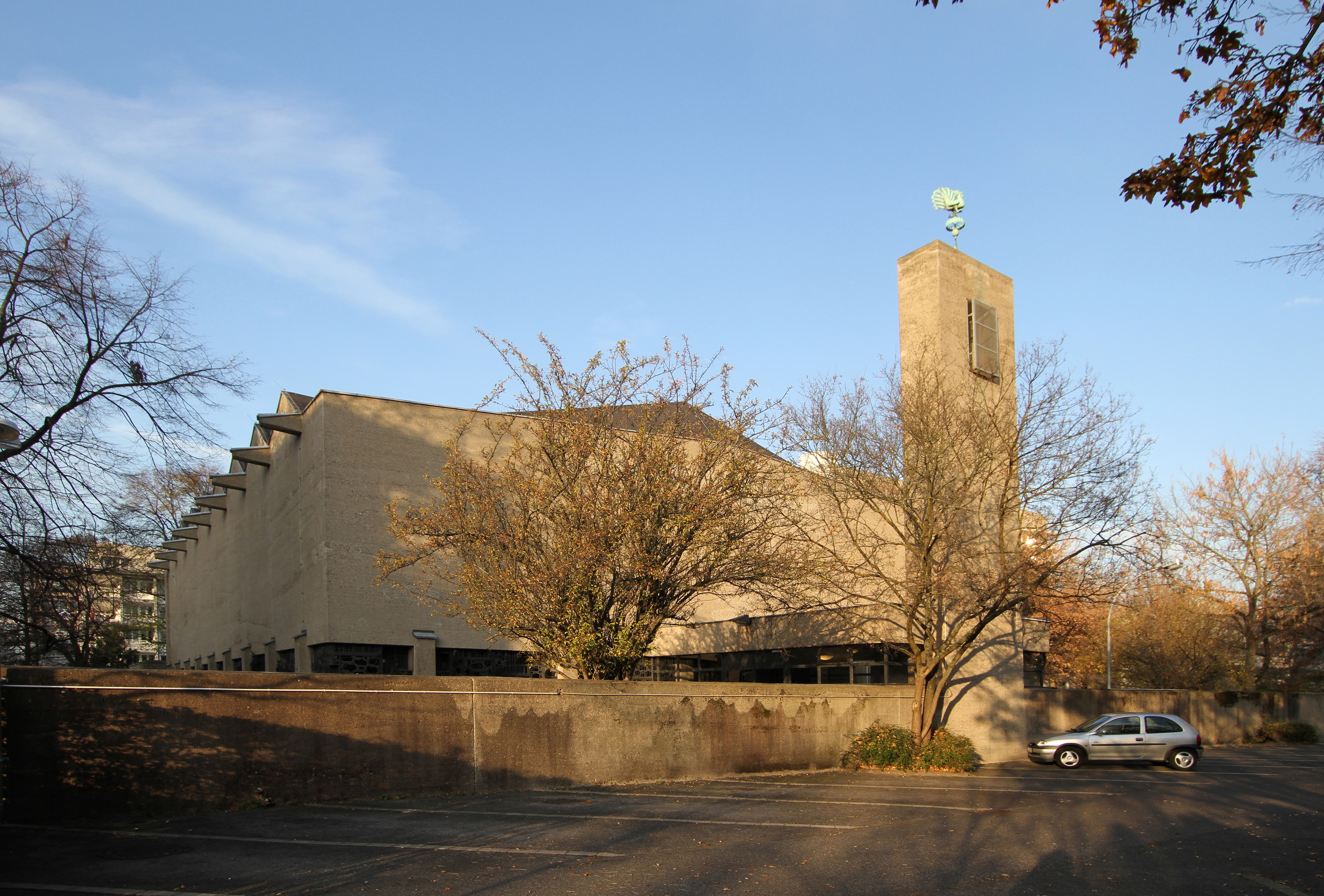 St. Johannes der Täufer - Katholische Universitätsklinikkirche in Köln-Lindenthal. Architekt: Gottfried Böhm